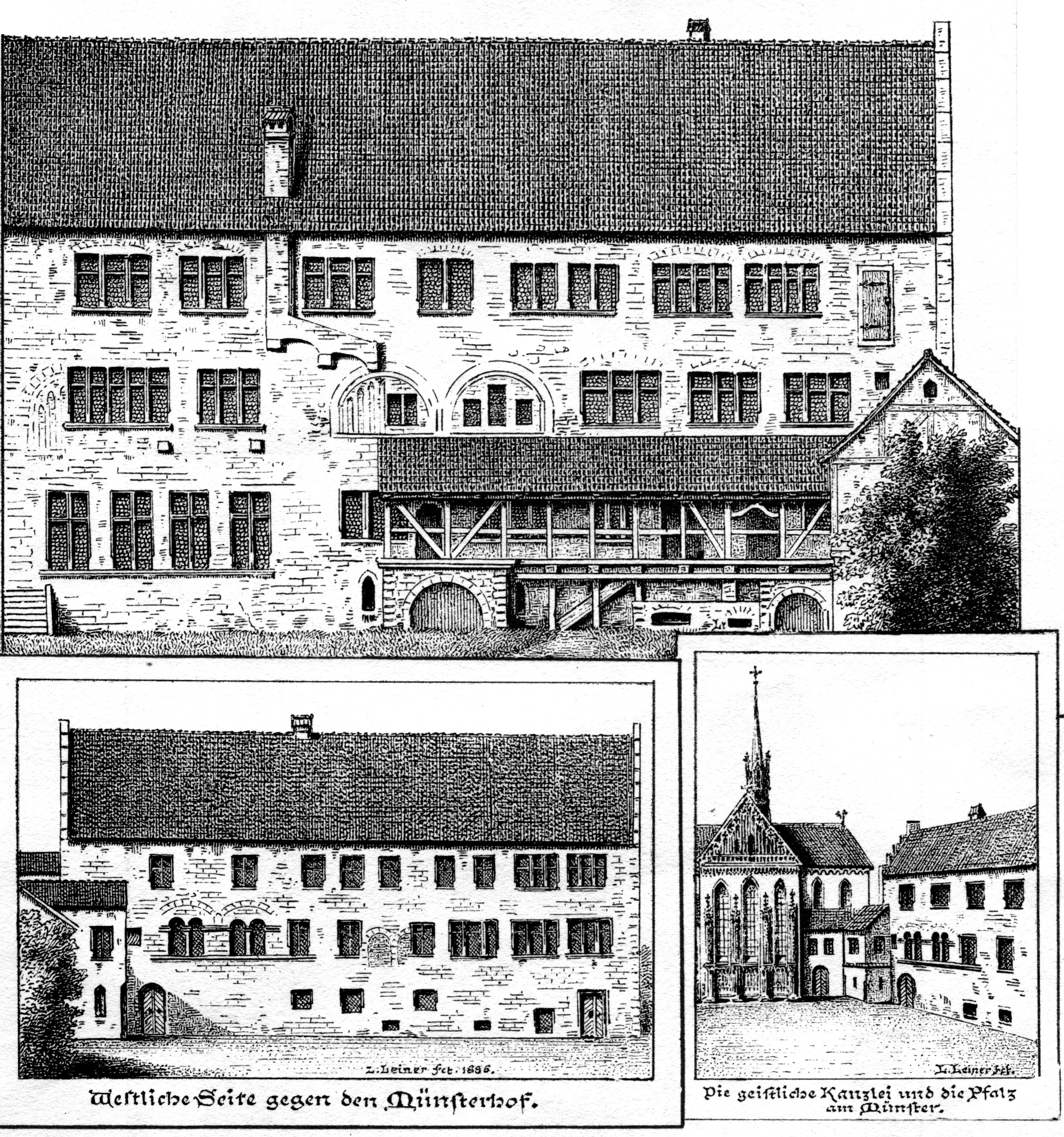 Ludwig Leiner (1830-1901): Bischofspfalz zu Konstanz (Rekonstruktion), 1886